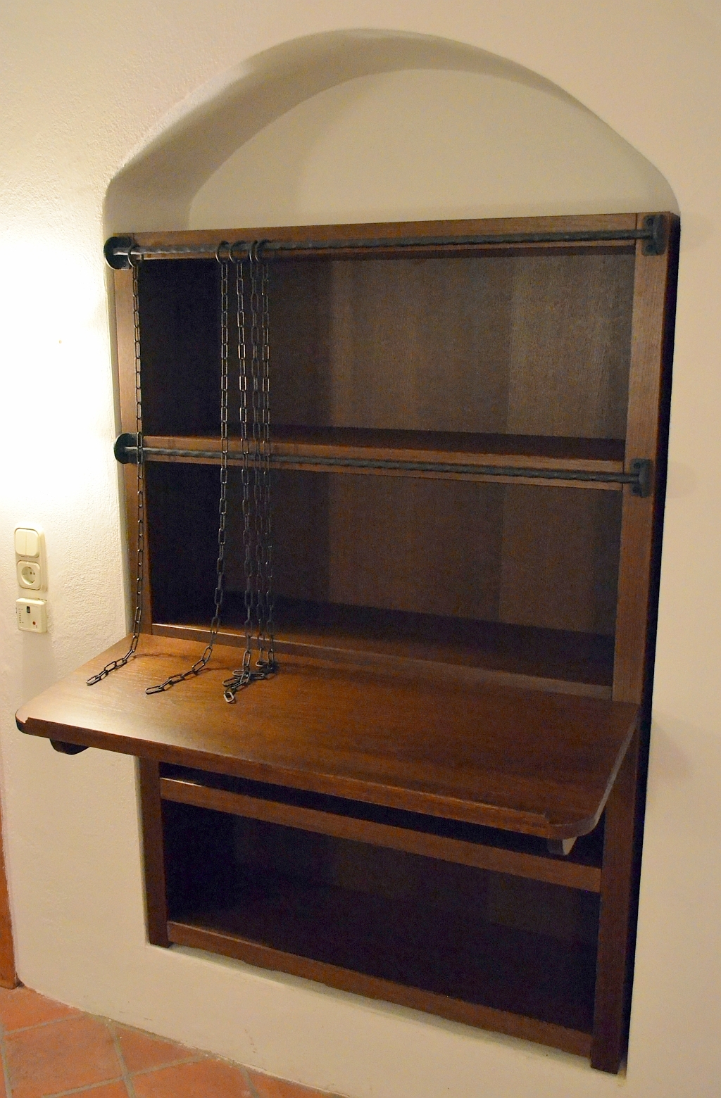 Braunschweig, Liberei: Rekonstruiertes Pultregal für Kettenbücher.